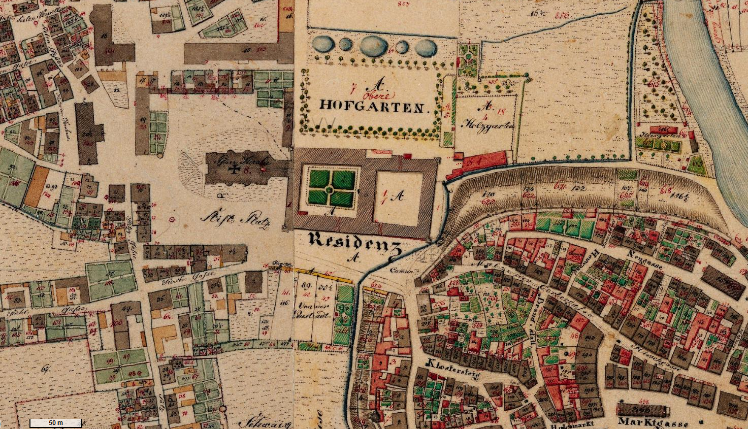 historische Flurkarte: Kempten, Hildegardplatz (damals Stifts Platz) und Umgebung